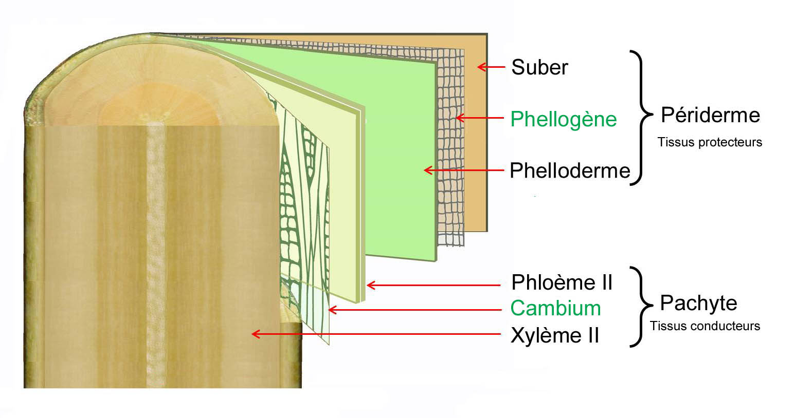 Structure secondaire d'une tige : Phloème II et xylème II, produits par le cambium. Suber et phelloderme, produits par le phellogène.